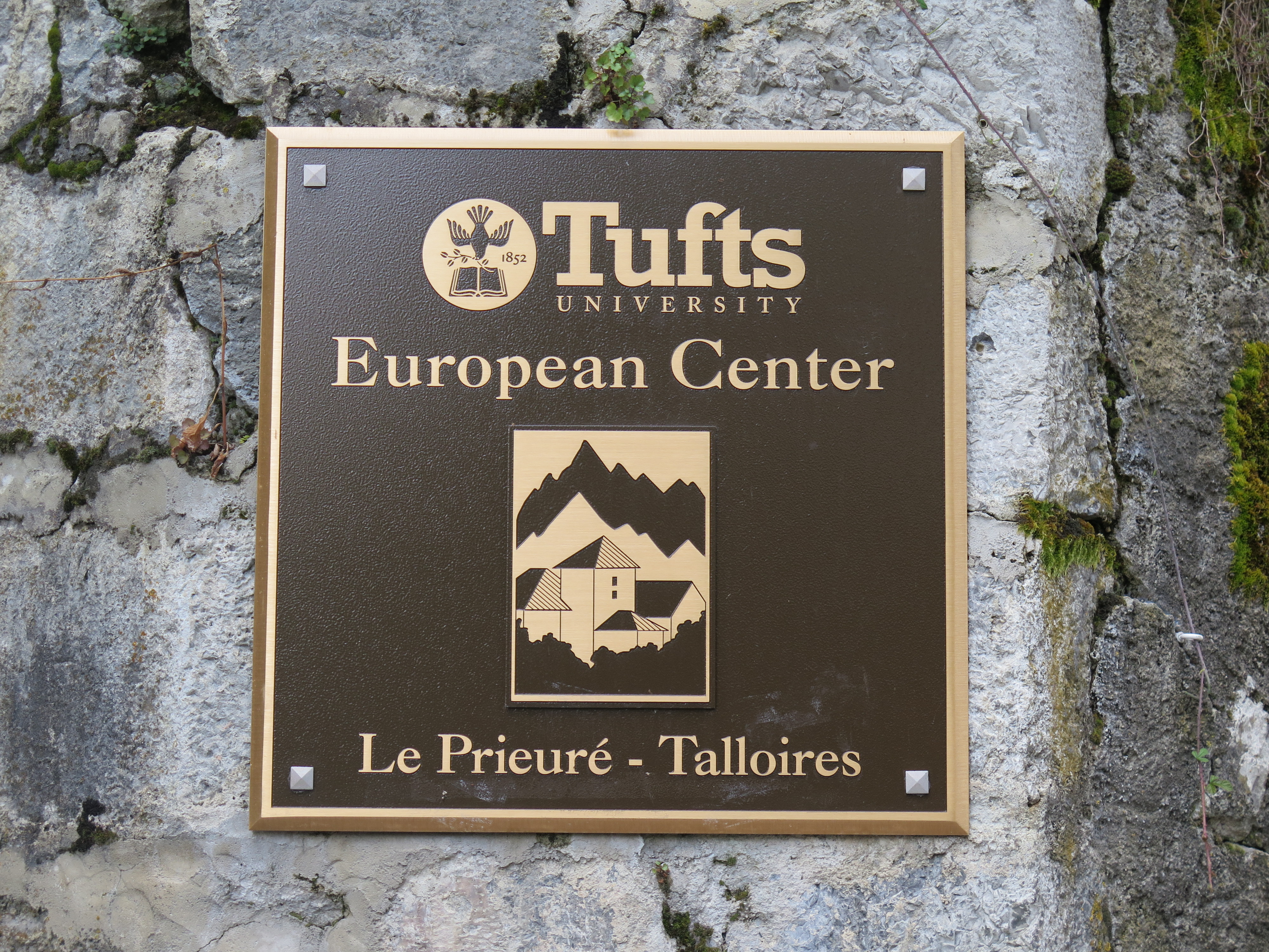 plaque à l'entrée du campus